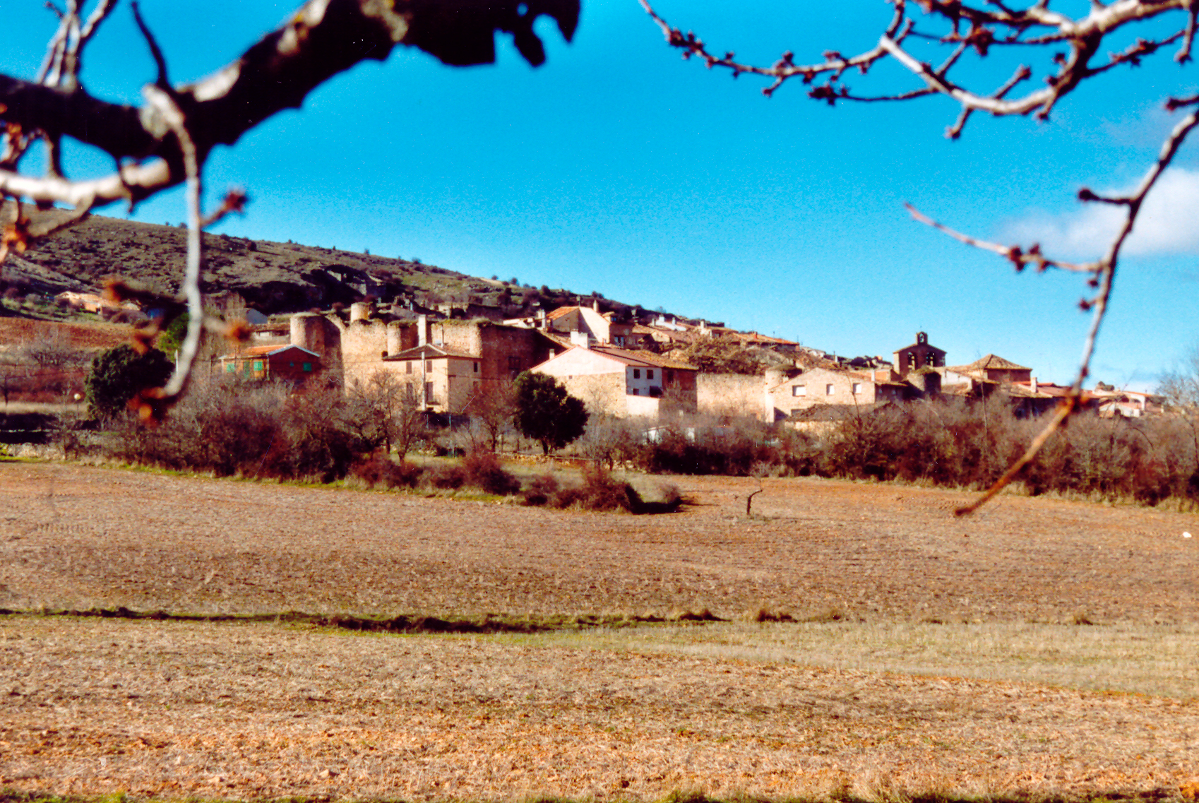 vista de la villa medieval de Palazuelos, Guadalajara